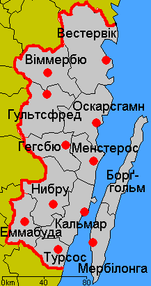 Карта адміністративного поділу лену Кальмар у Швеції. Карту створено на основі карти File:Kalmar Municipalities.png.